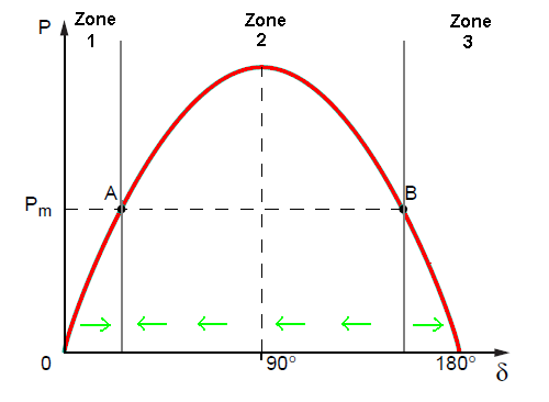 Stabilité des points d'équilibre d'un générateur synchrone